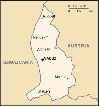 Mapa Liechtensteinu, wersja polska, z CIA World Factbook